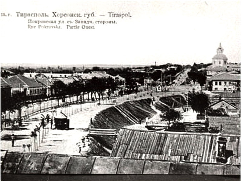 УЛ. ПОКРОВСКАЯ В НАЧАЛЕ 20 ВЕКА Тираспольский уезд